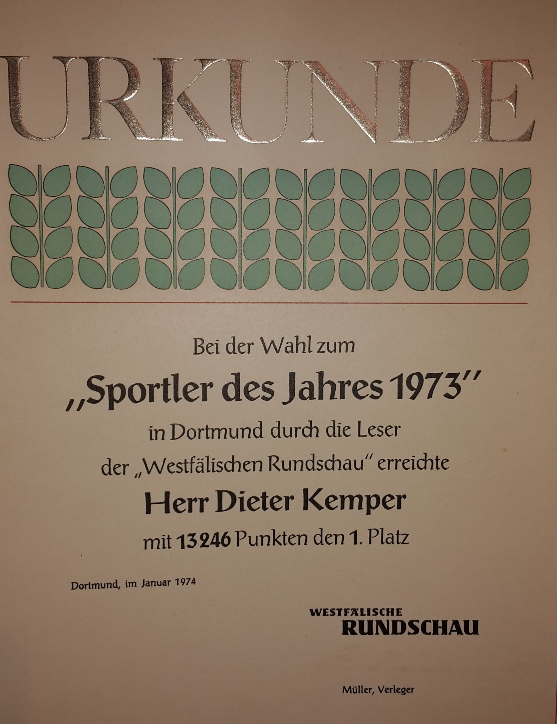 Dies ist ein Foto der Original-Urkunde der Sportlerwahl des Jahres von 1973. 1. Platz Dieter Kemper